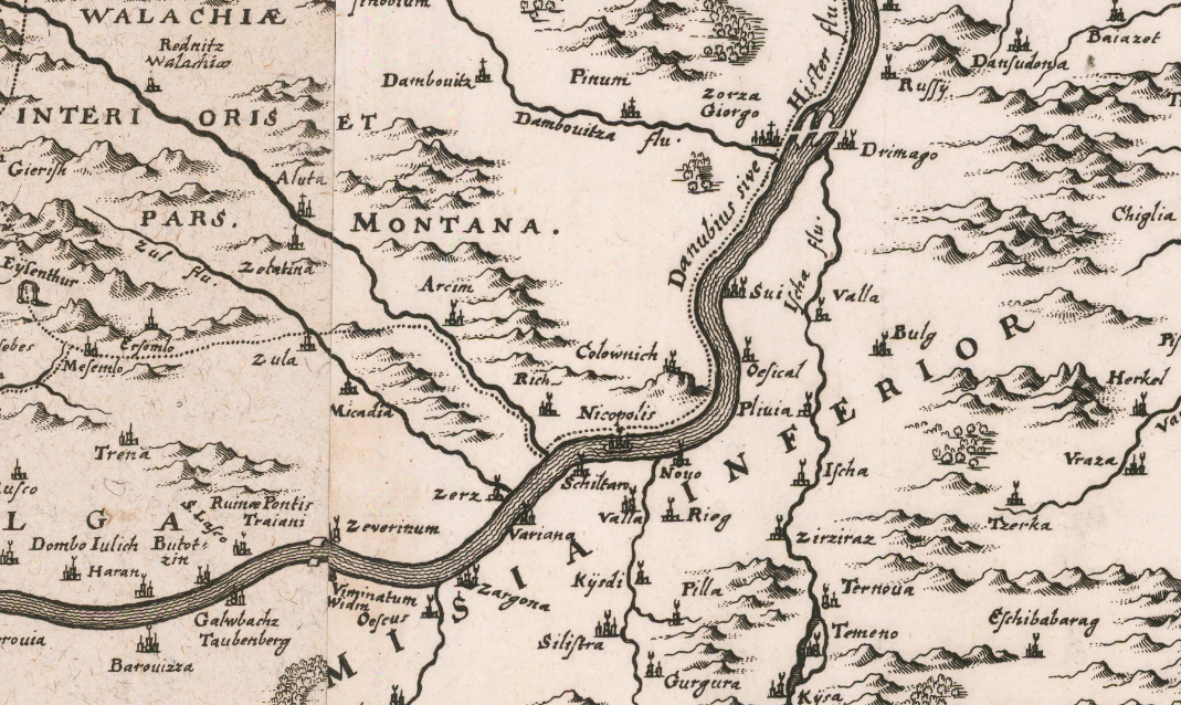 Totius Regni Hungariae Maximae que Partis Danubii Fluminis, una cum adjacentibus et finitimis Regionibus Novissima Delineatio by Wilhelm Serlin (Frankfurt - 1995)